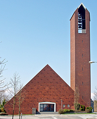 Christianskirken Århus Kommune, Denmark